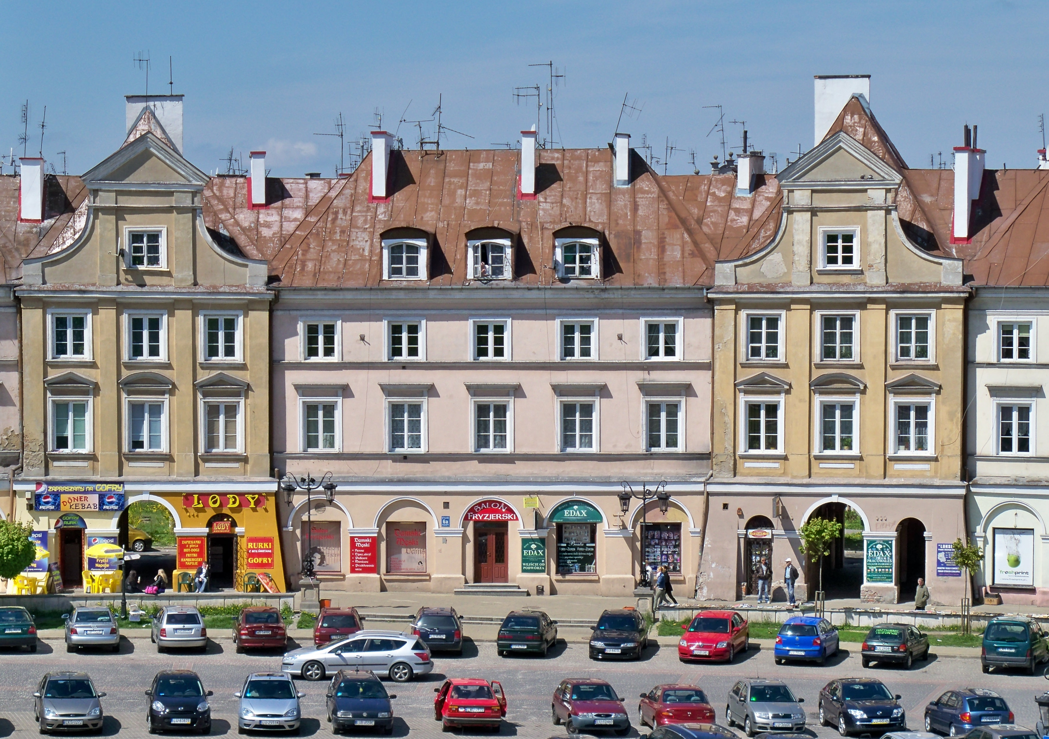 Zachodnia pierzeja pl. Zamkowego w Lublinie. Kamienica z numerem 6a.